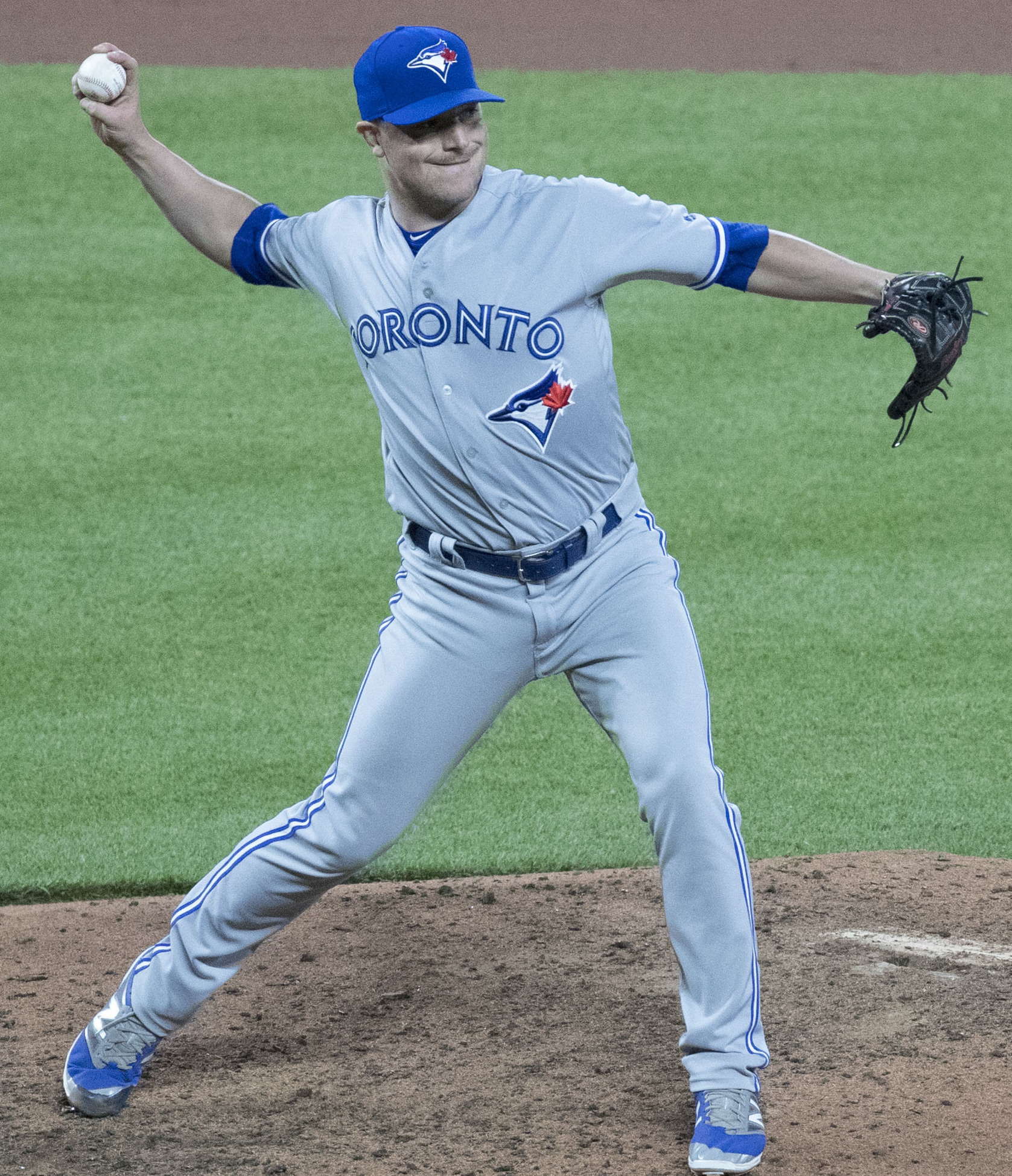 Blue Jays at Orioles 5/19/17